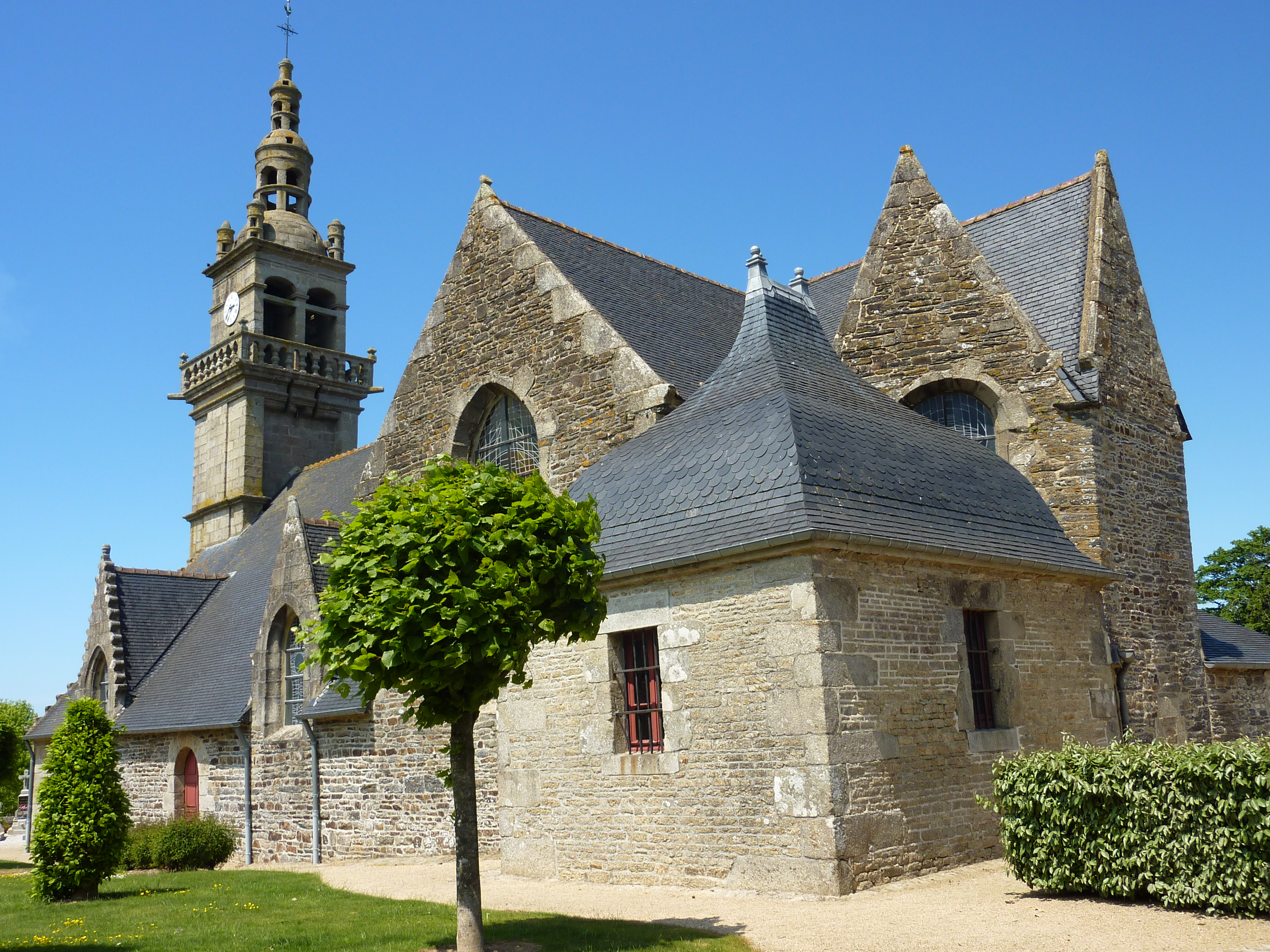 Eglise paroissiale de Saint-Sauveur (Finistère), vue générale